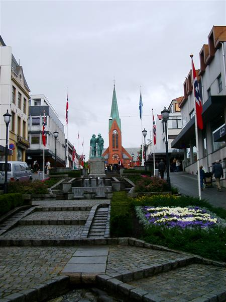 Ansicht Haugesund